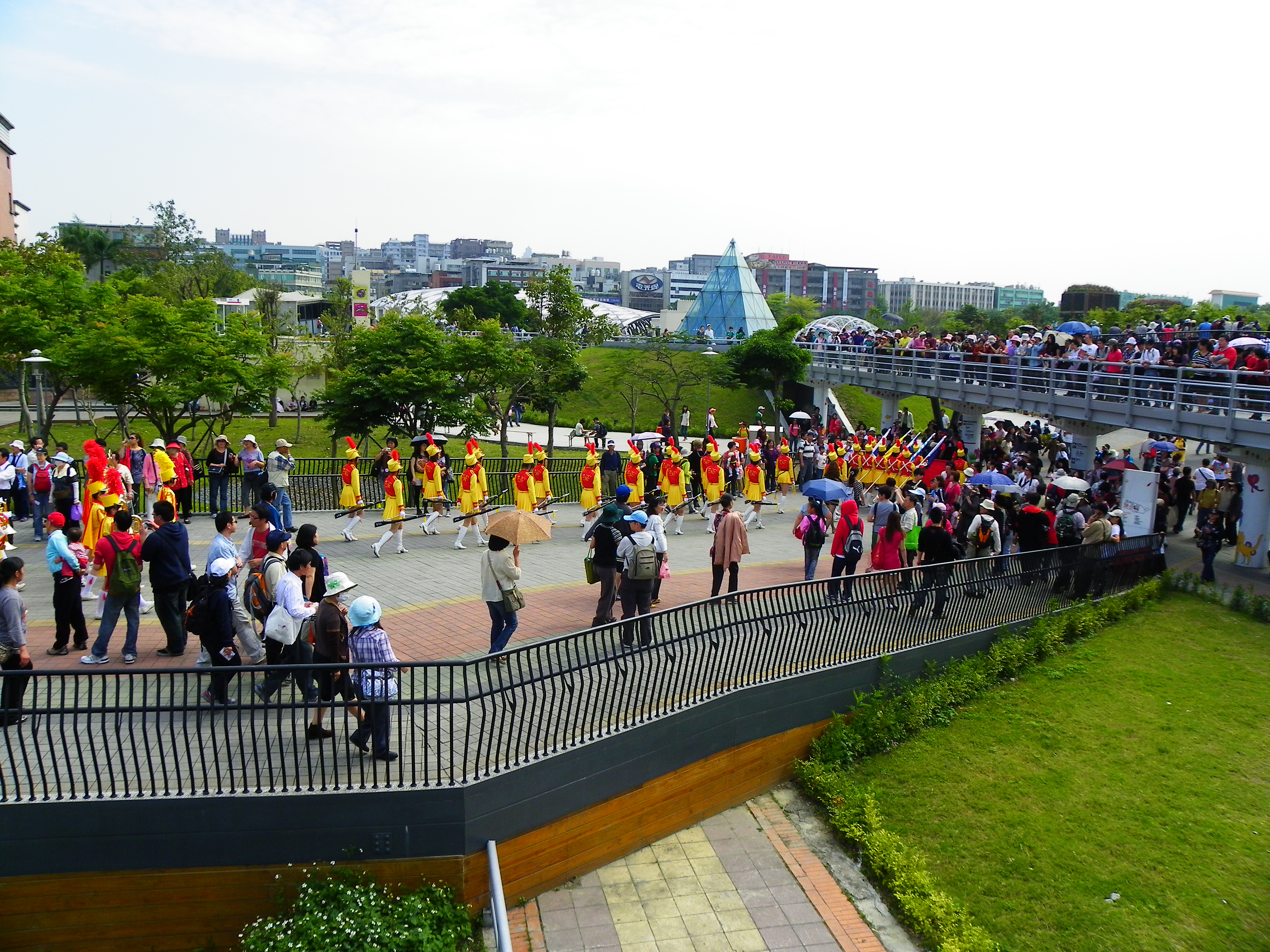 2010臺北國際花博閉幕式，景美女中樂儀隊開始行進，遊客於四週爭睹風采。